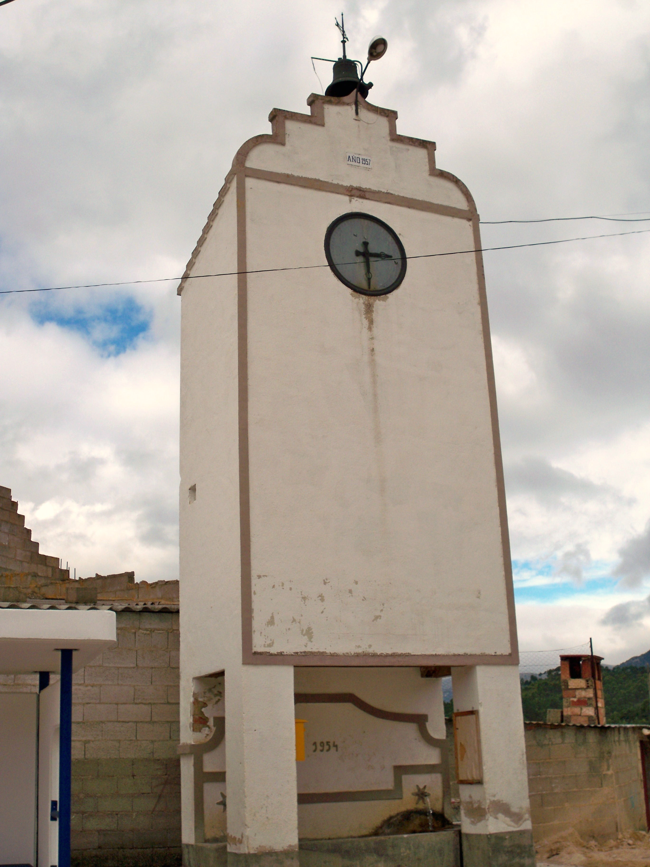 Fotografía del reloj en la plaza Mayor de la localidad de Torre - Pedro, Albacete.